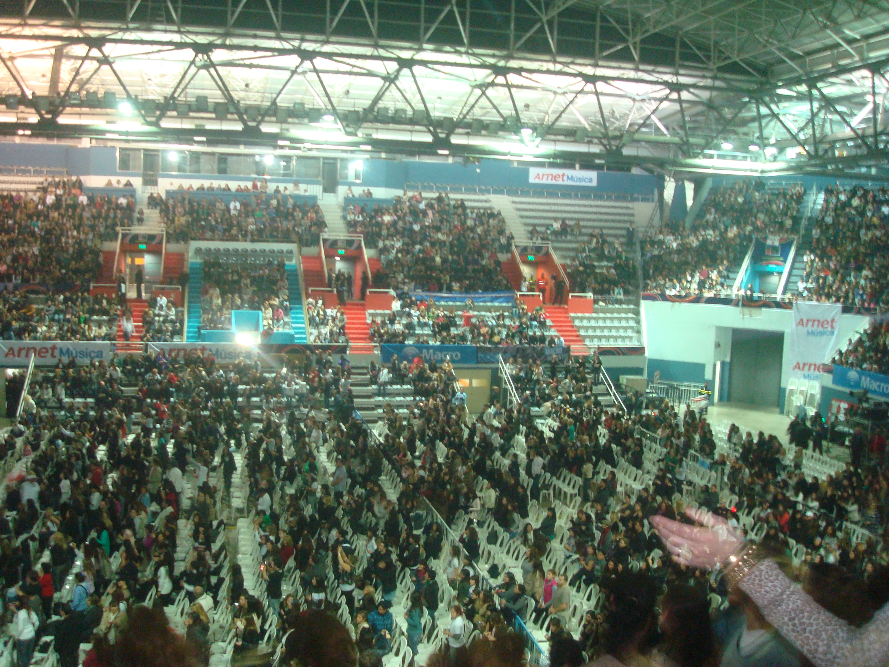 Tiene capacidad para 9.000 personas, en el se presentaron importantes figuras y eventos internacionales como Ricky Martin, Roxette, Gloria Gaynor, Ricardo Arjona, La Oreja de Van Gogh; final de la Copa Davis 2008, entre otros.